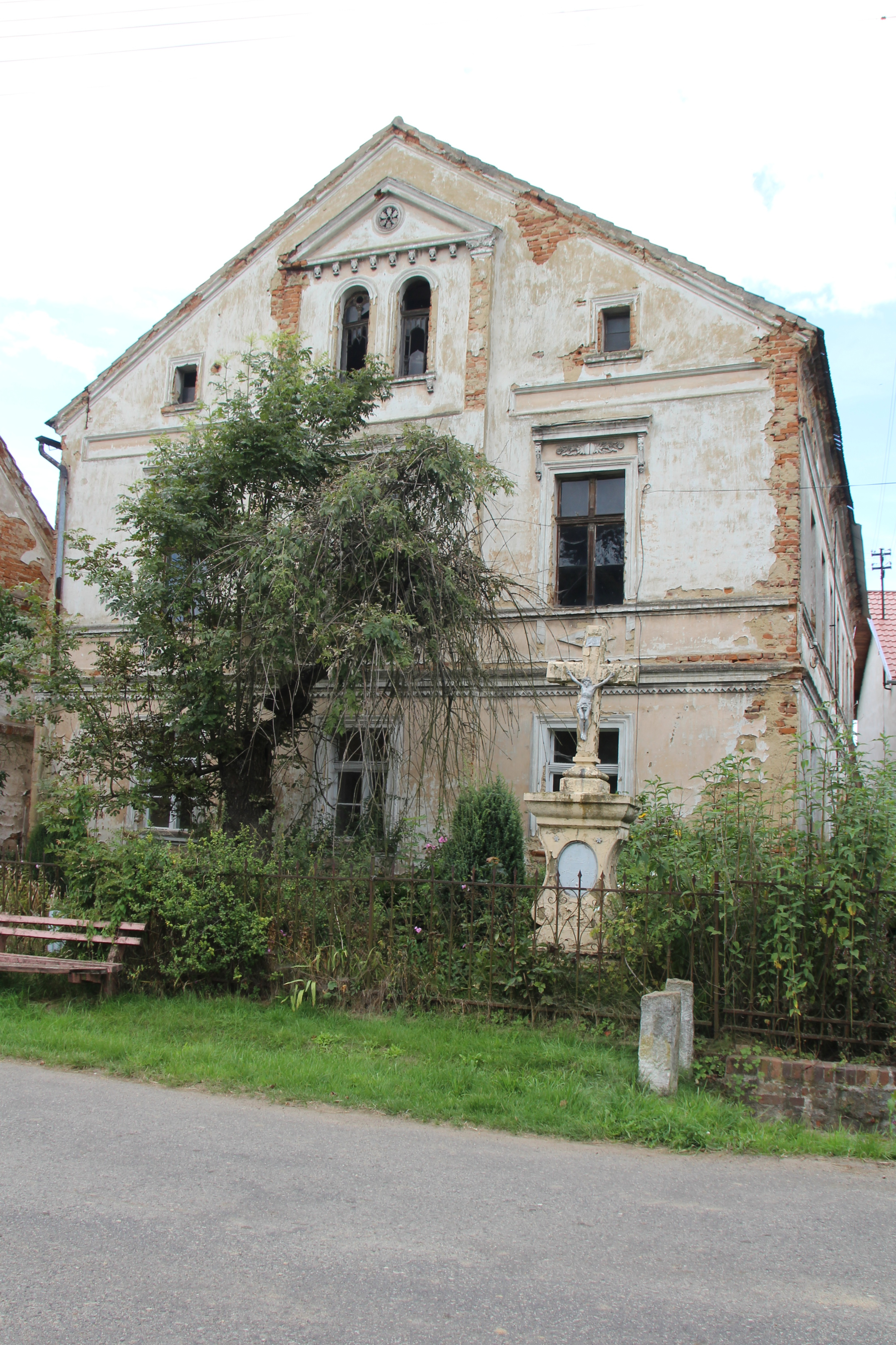 Ogonów – wieś w Polsce położona w województwie opolskim, w powiecie nyskim, w gminie Kamiennik.